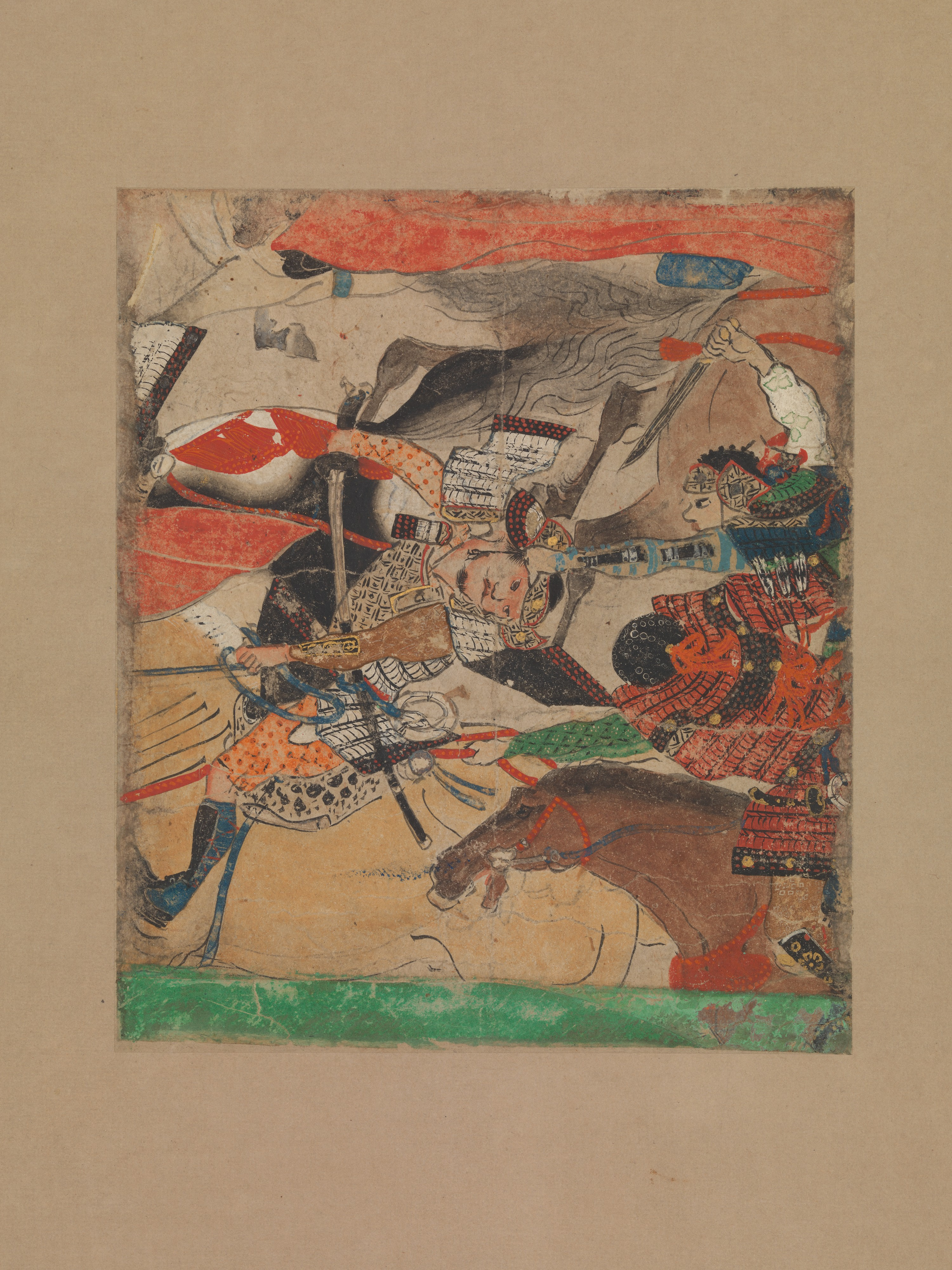 Japan; Hanging scroll; Paintings